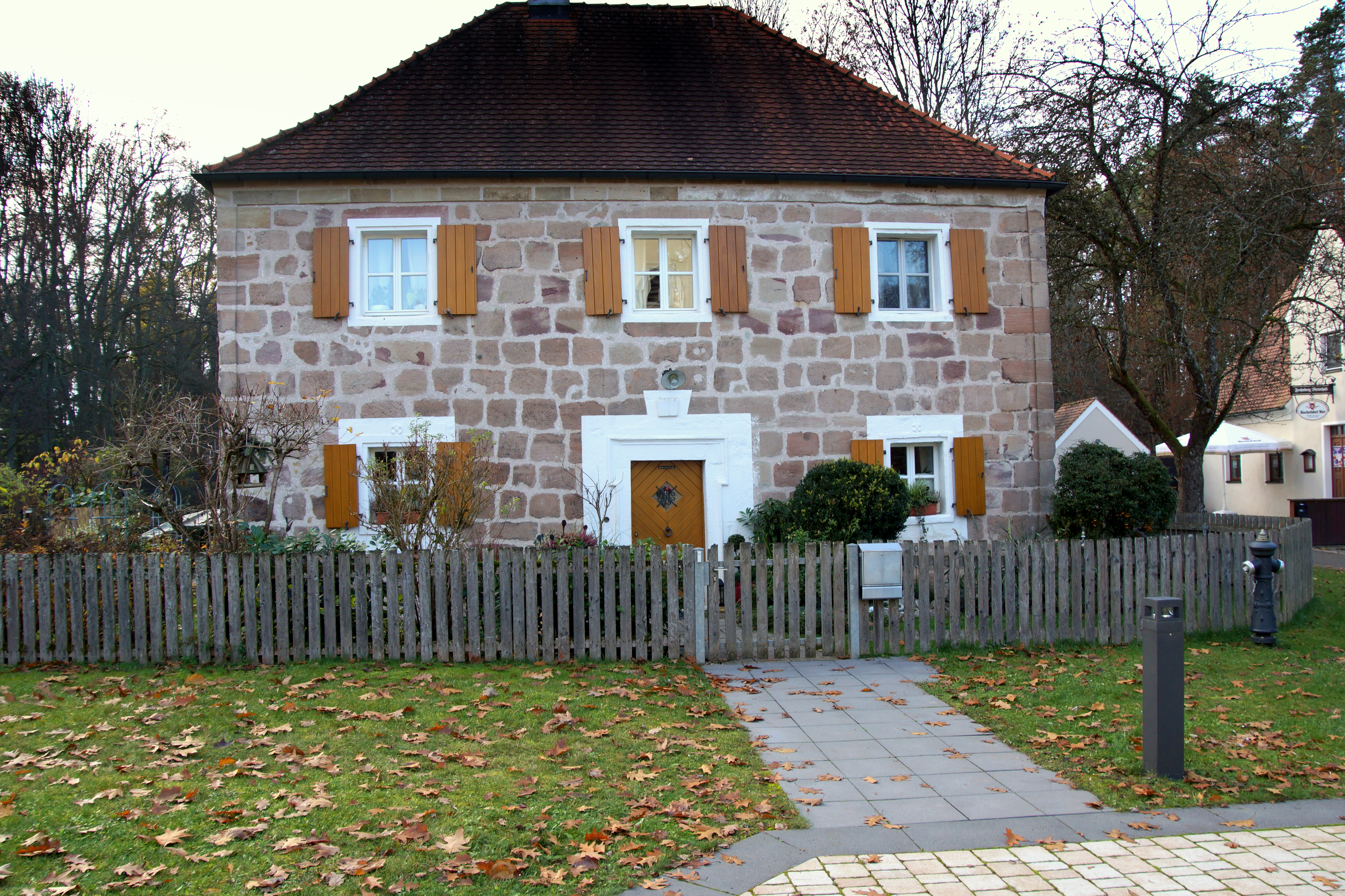 Der Frohnberg bei Hahnbach in der Oberpfalz